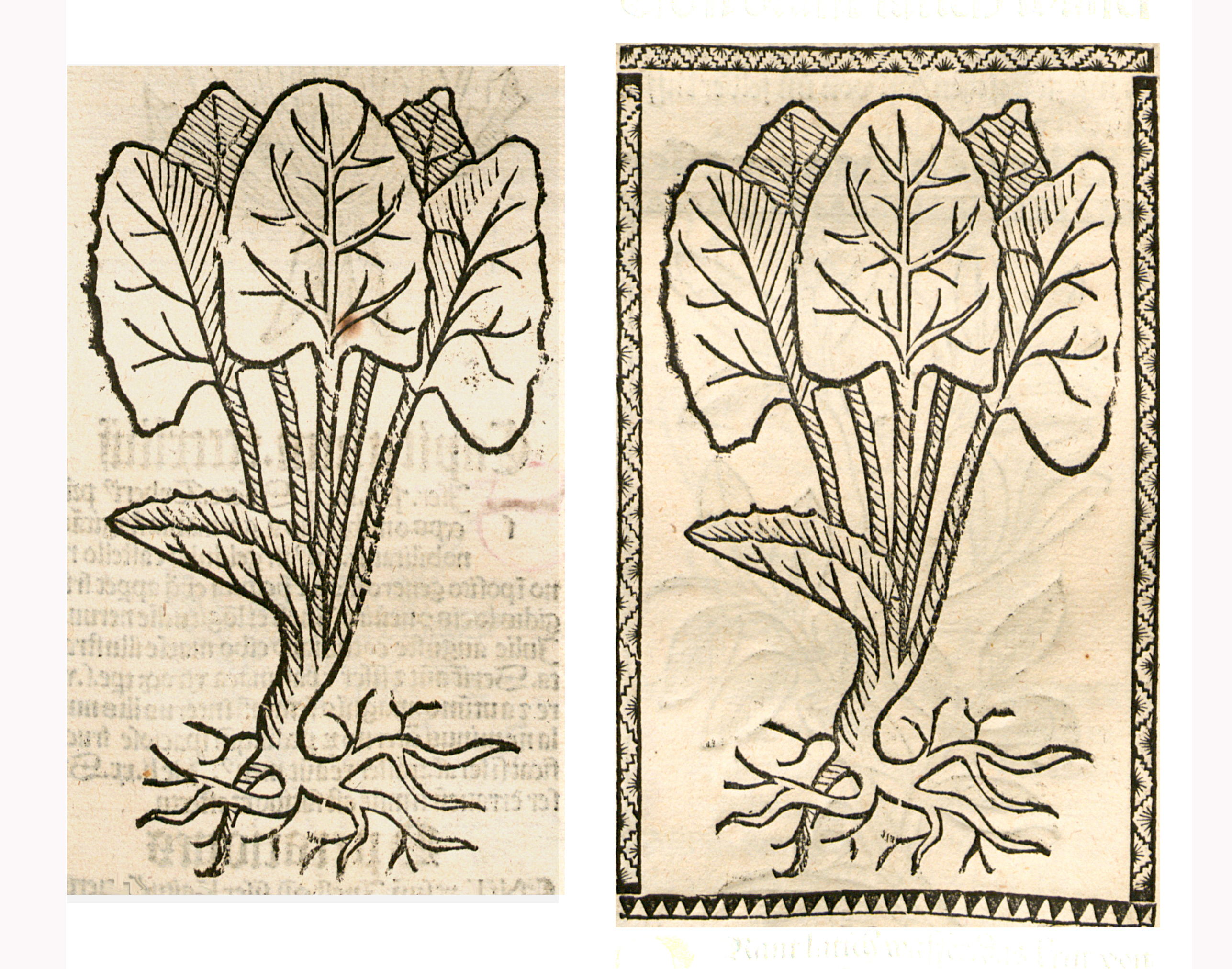 Abbildung von: Huflattich